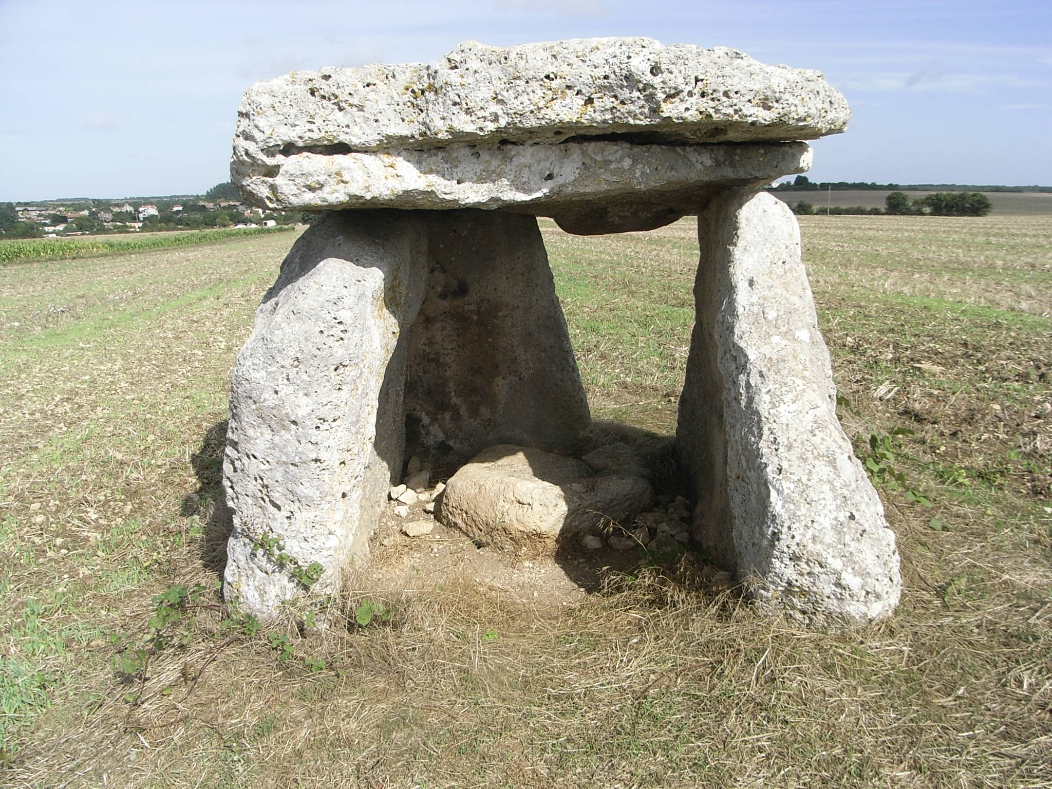 Dolmen dit la Pierre Levée à Ardillières (17) France, monument historique classement par liste de 1989 (vue sud-est). .